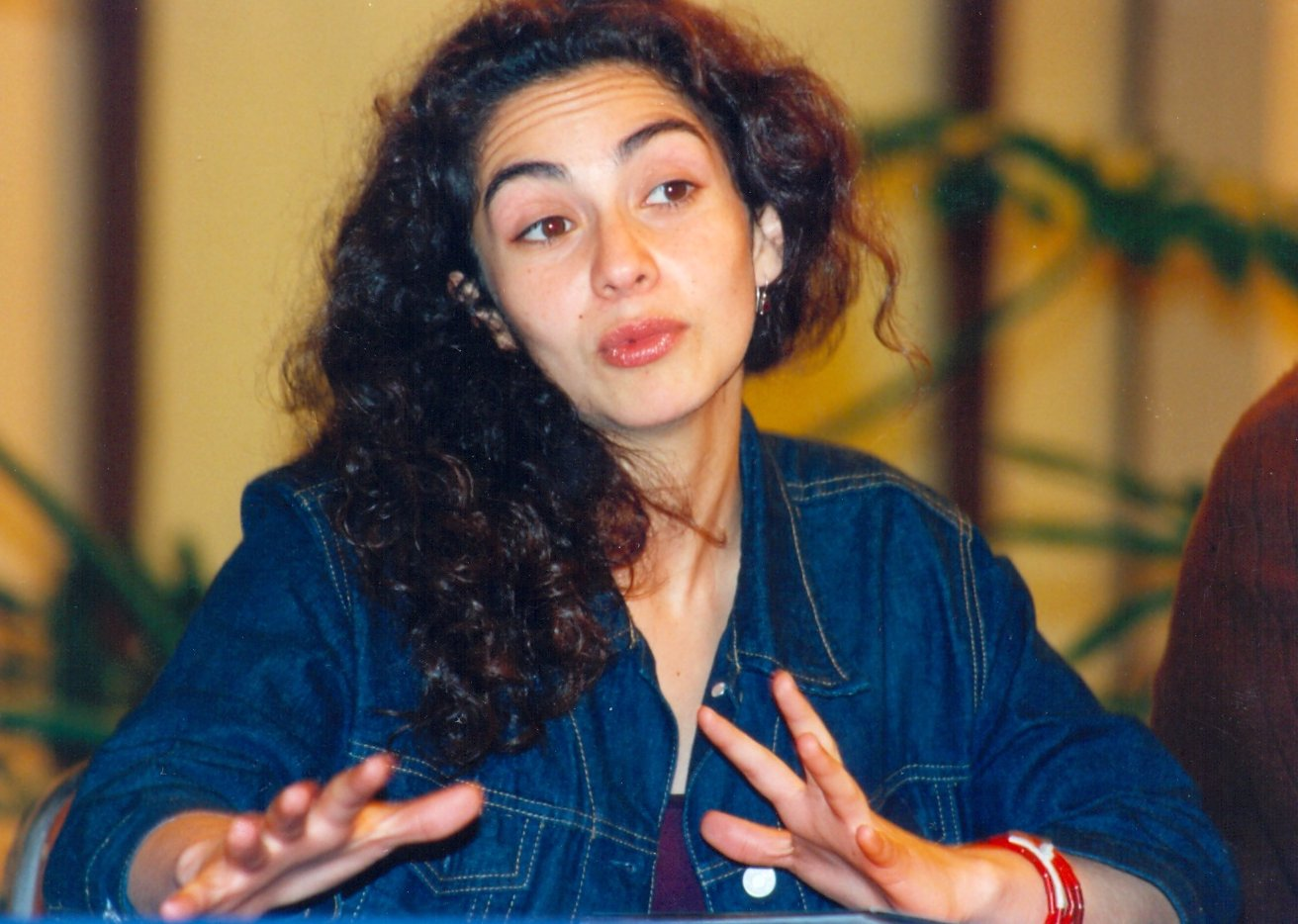 Tamara Acosta; Pelicual El Desquite; Año 1999